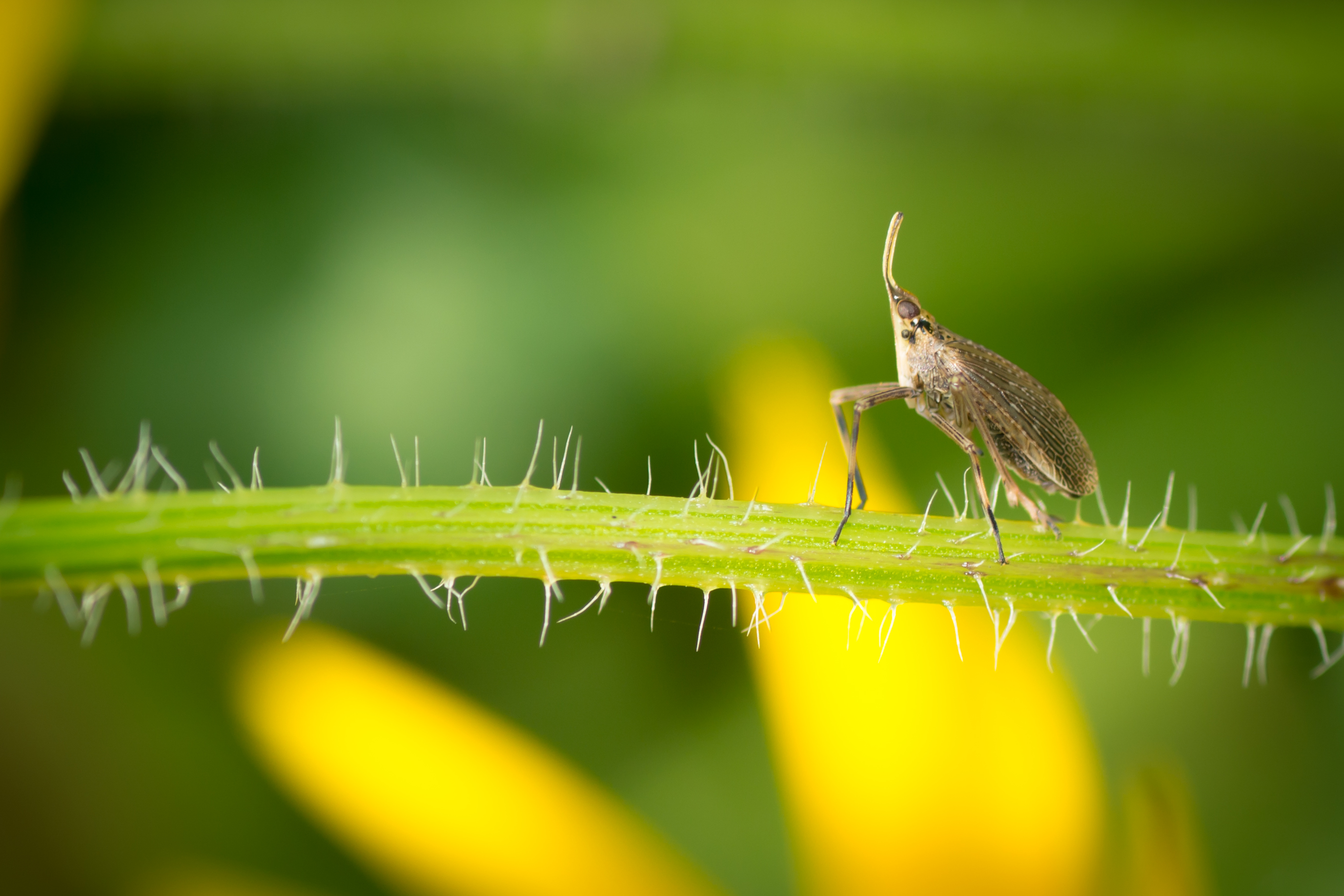 Rentschler Forest Metropark, Fairfield, Ohio